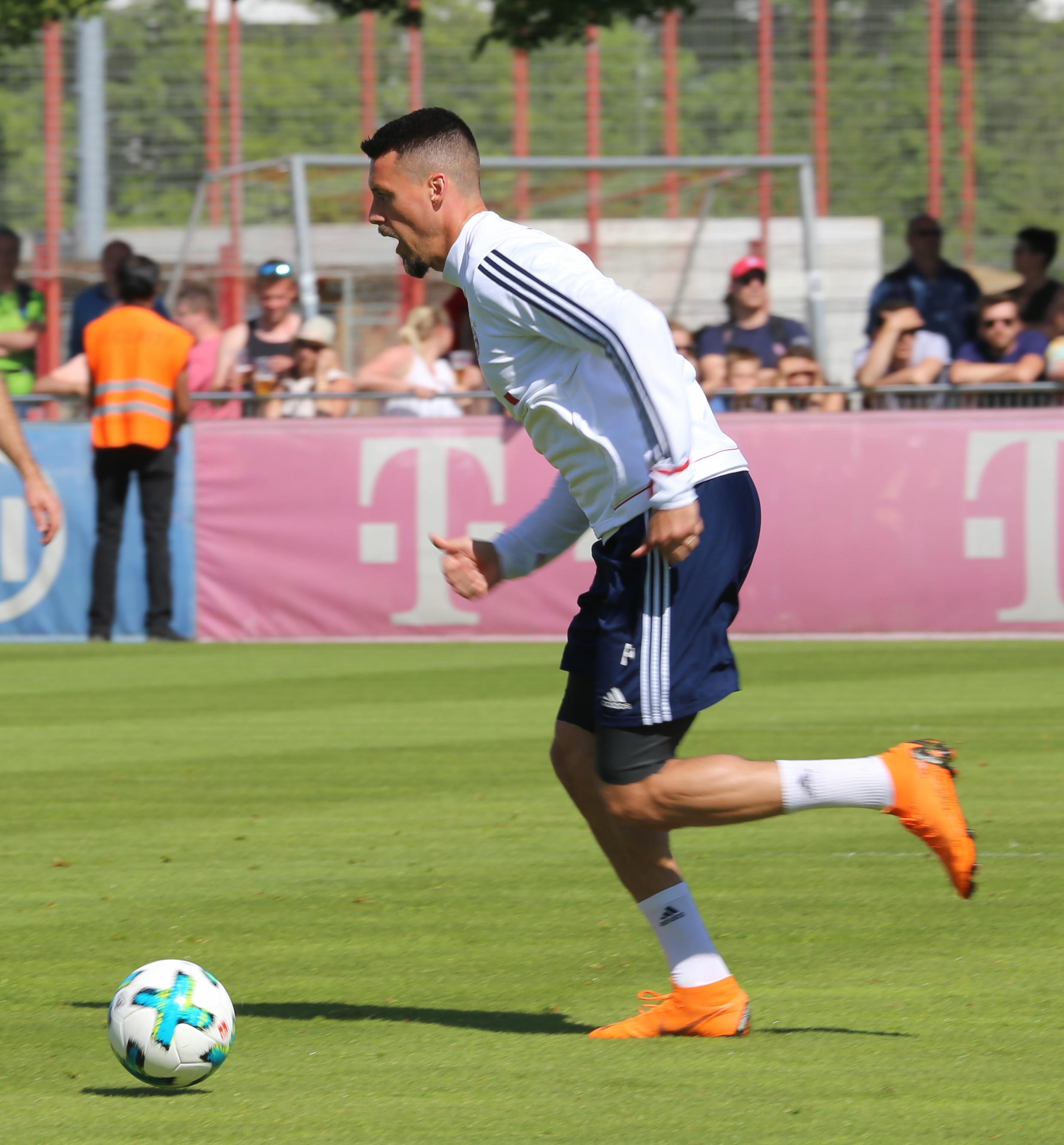 Sandro Wagner, am 8. Mai 2018 beim Training auf dem Gelände des FC Bayern München